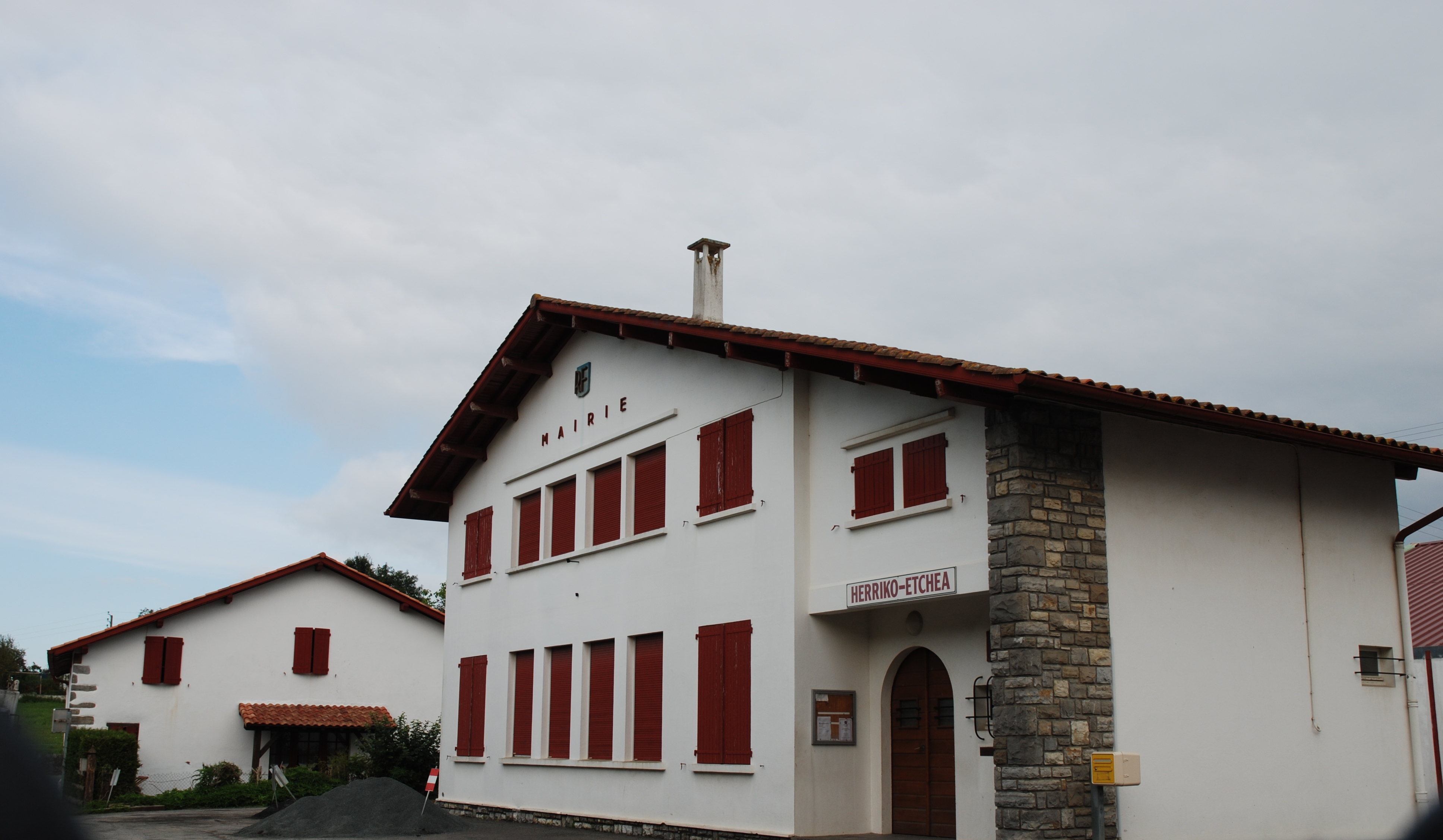 Armendarits, la mairie